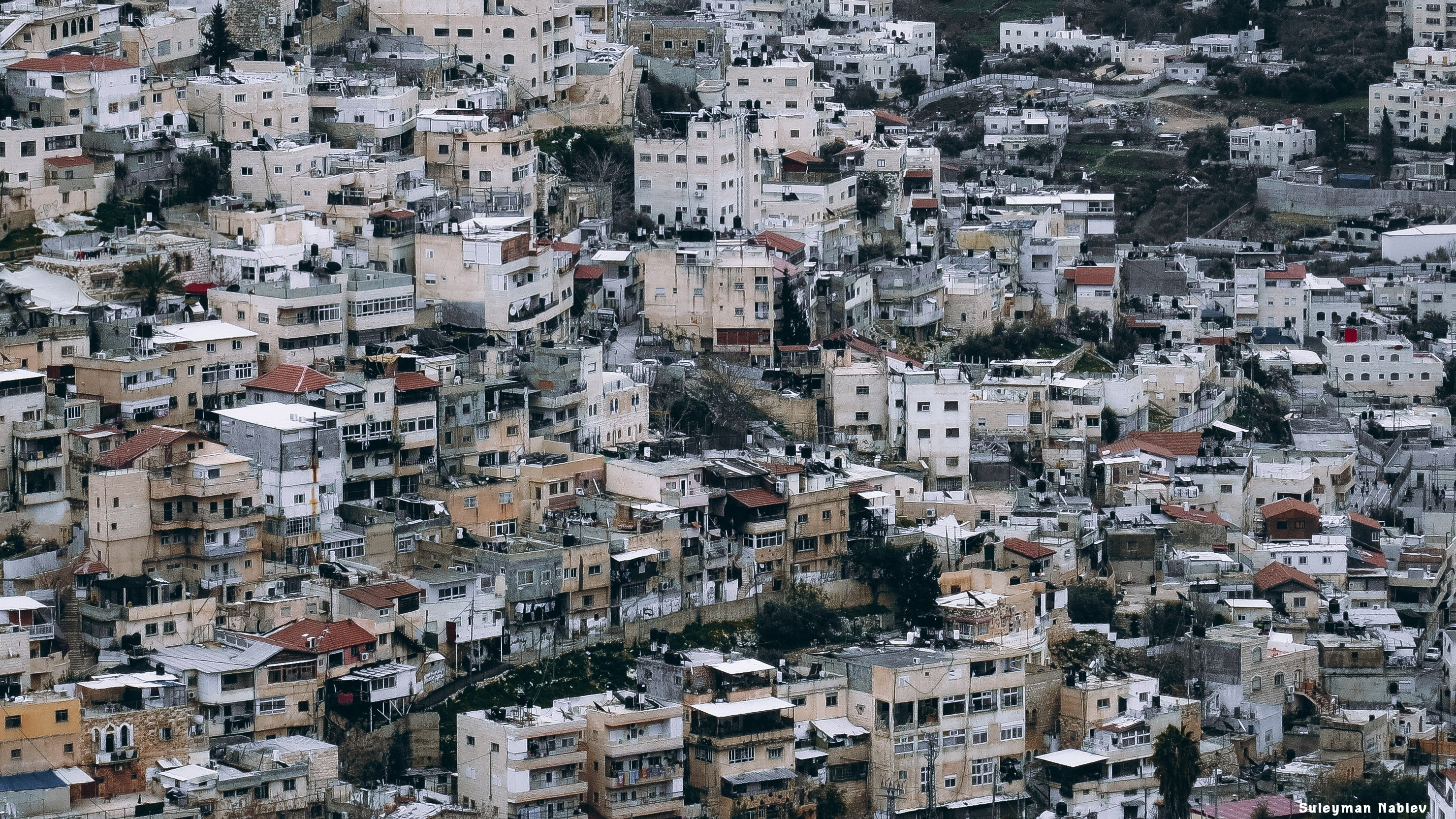 Иерусалим